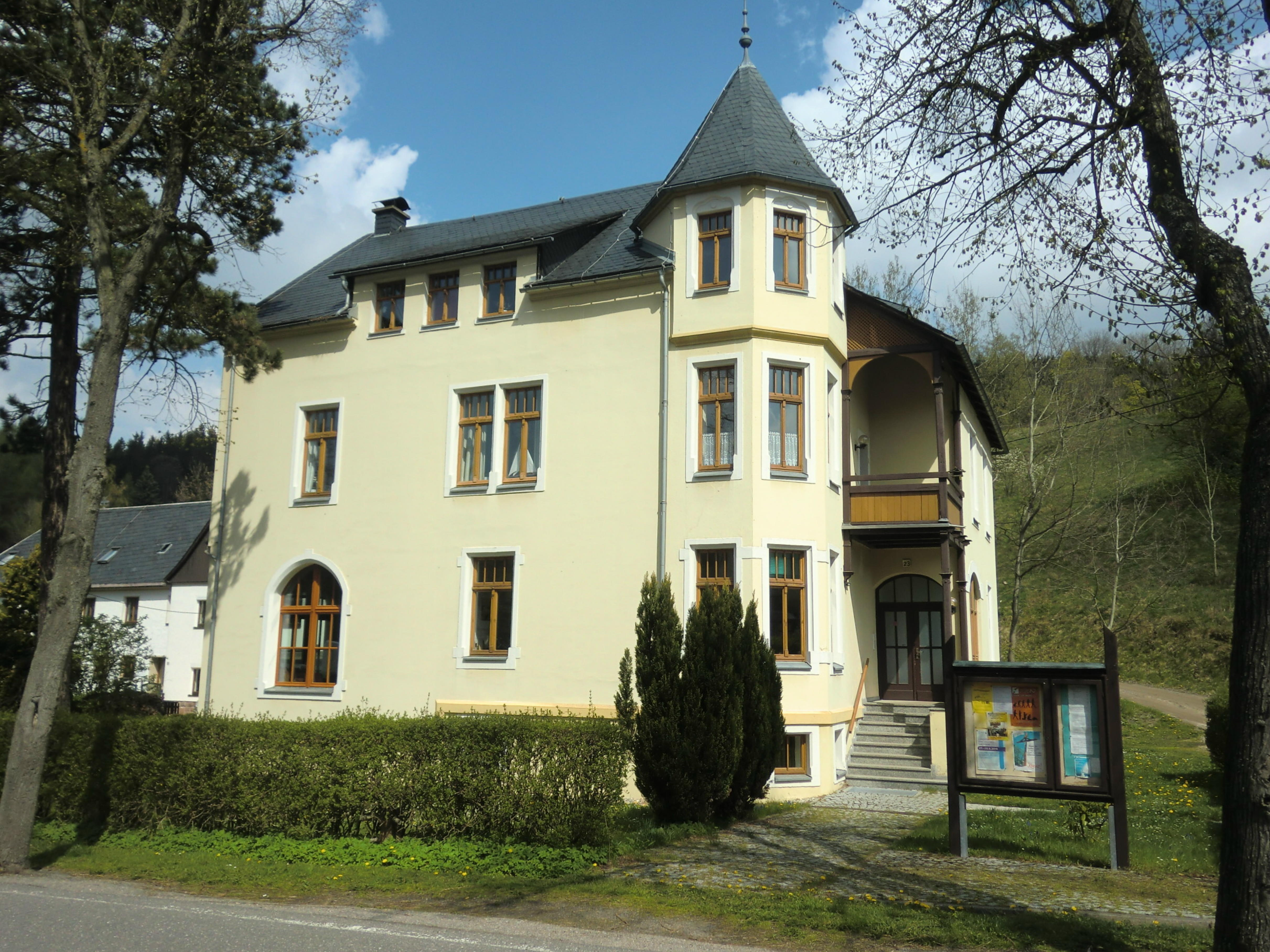 Kirche in Rechenberg im Osterzgebirge. Pfarramt, 1901 erbaut.